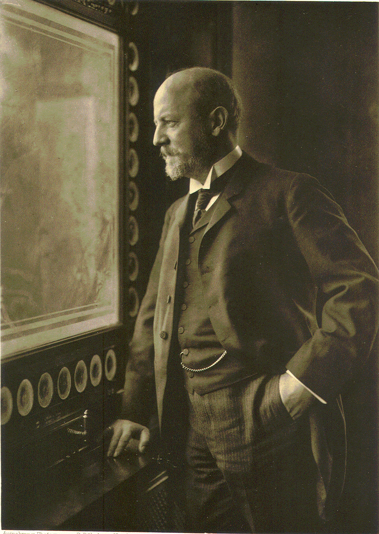 Theodor Deneke (1860–1954), Arzt, Leiter des AK St. Georg